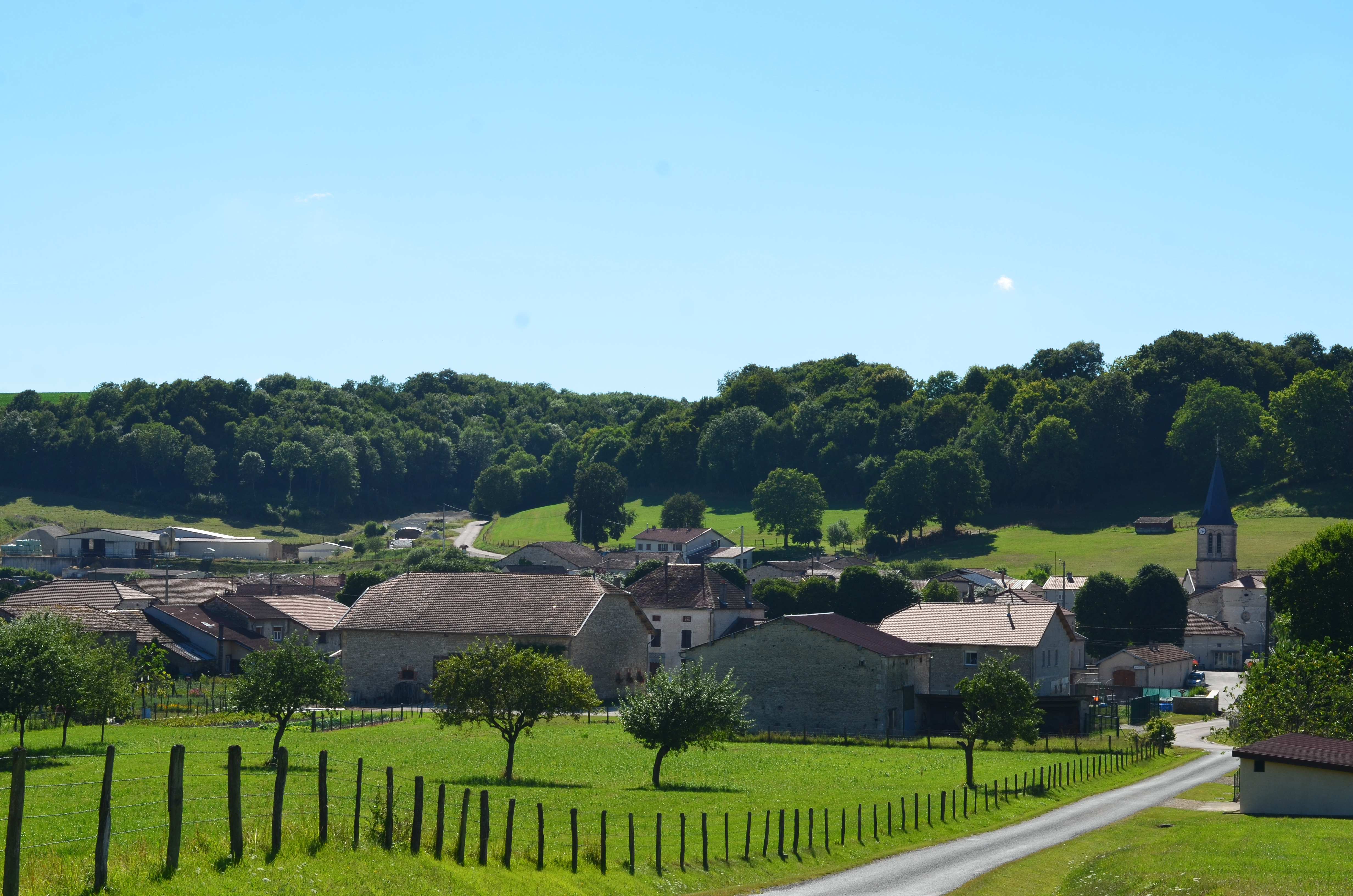 Vue de Leschères-sur-le-Blaiseron depuis la fontaine du village